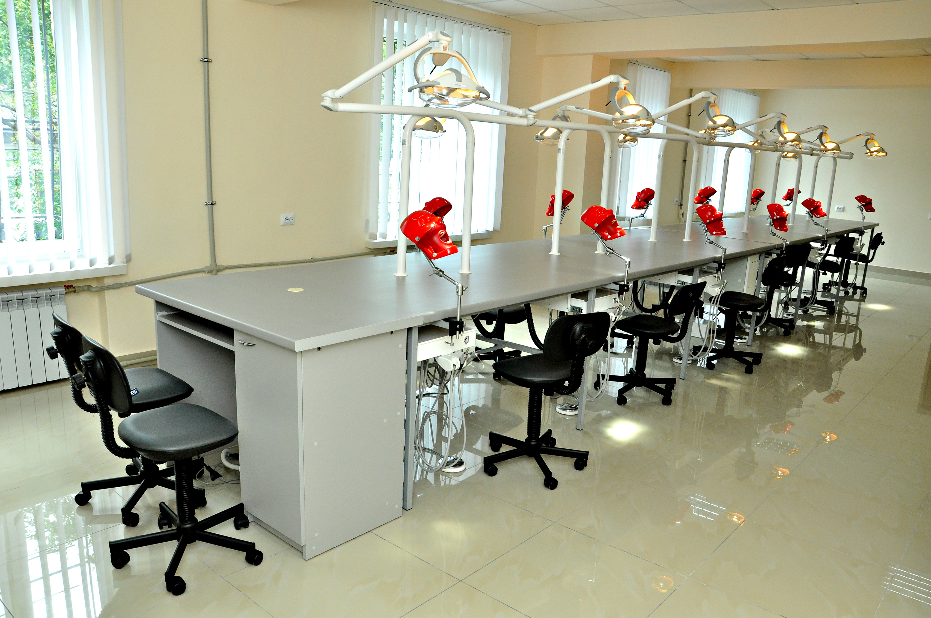 Фантомний клас стоматологічного факультету Тернопільського державного медичного університету імені І. Я. Горбачевського.